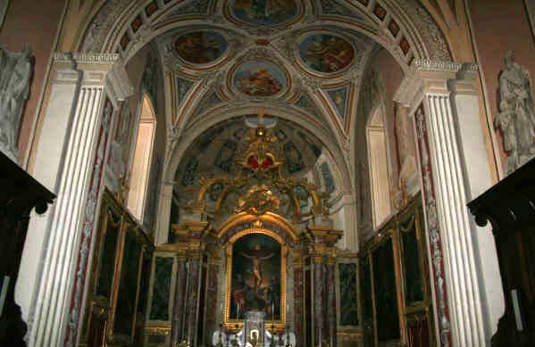 Décor en trompe l'oeil en 1852 par Jacques Frédéric Antoine PAUTHE (signé) de la totalité de l'édifice. Décoration restaurée au milieu des années 1990.